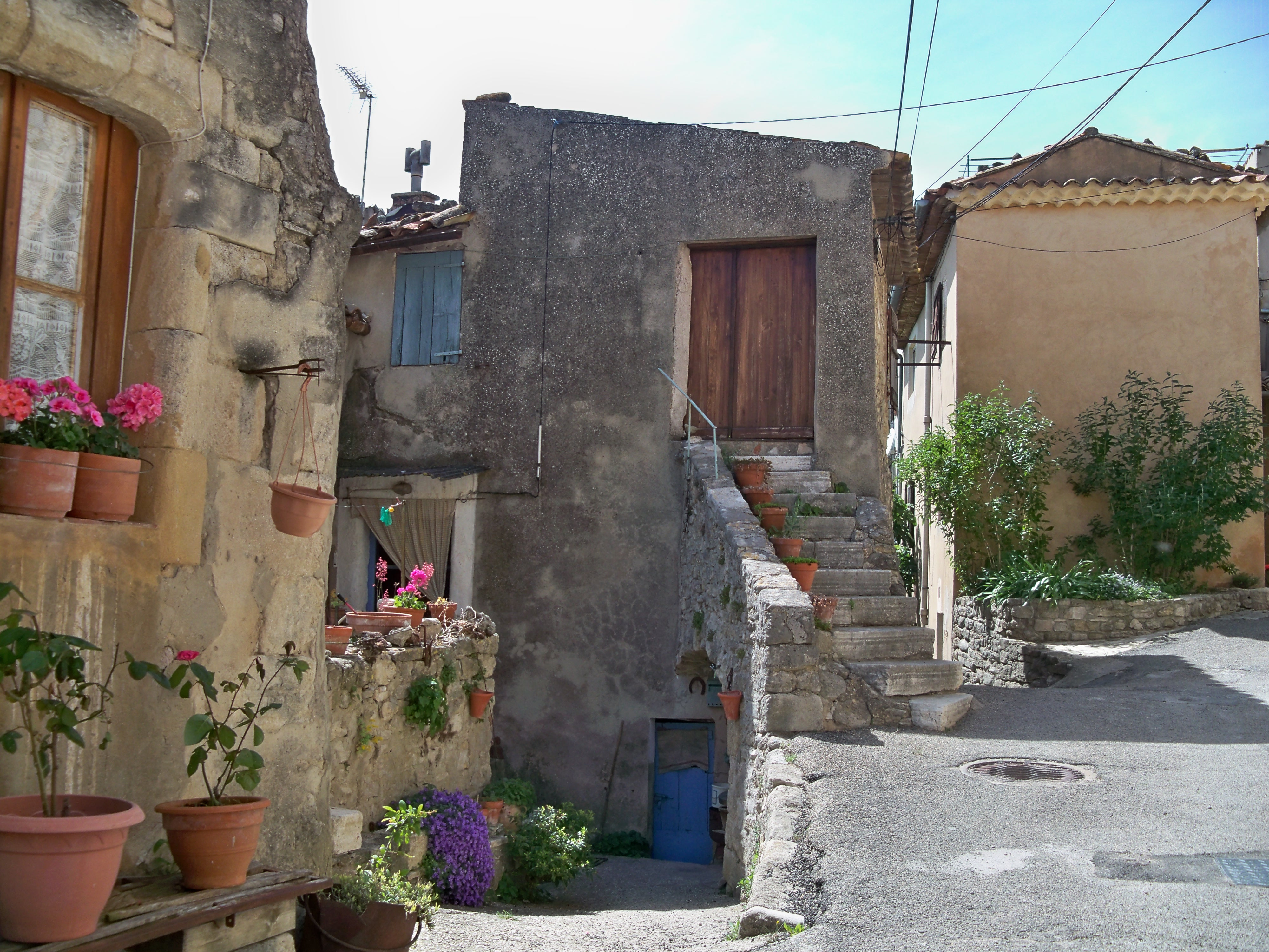 habitat à Saint Martin de Castillon, Vaucluse, France